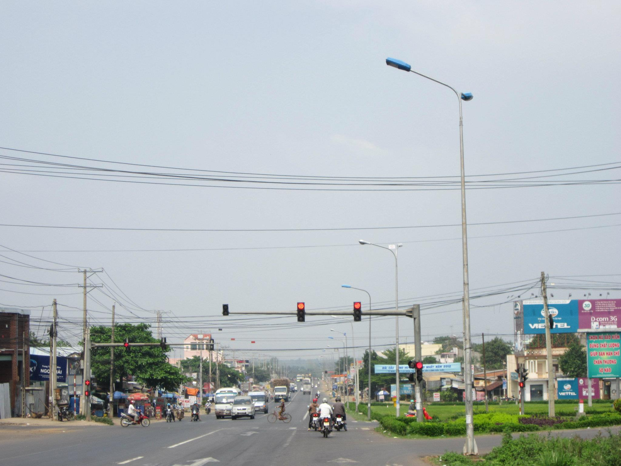 Ngã tư Dầu Giây